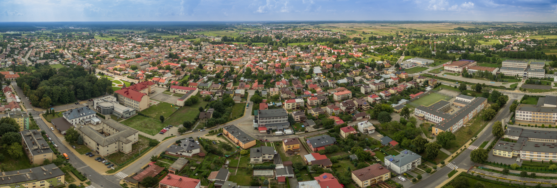 Das Stadtzentrum von Janów Lubelski